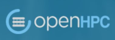 Das Logo des openHPC-Projects der Linux Foundation.